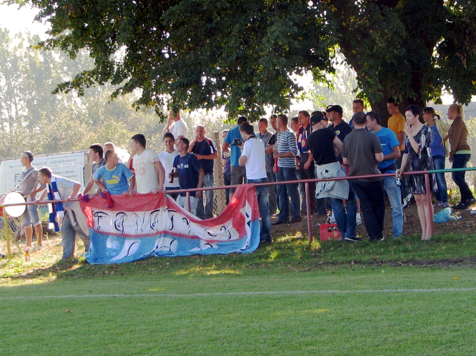 Wojcieszyce. Kibice SHT